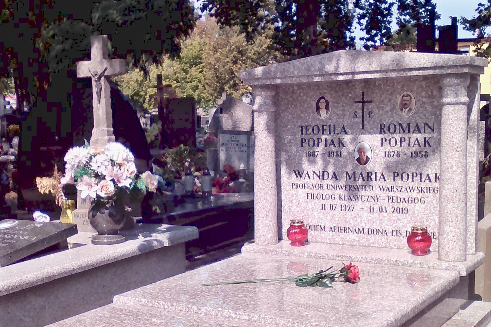 Grób Wandy Popiak na Cmentarz na Służewie przy ul. Wałbrzyskiej w Warszawie (linia 13 lewa, nr 50). Pochowana razem z rodzicami Teofilą i Romanem Popiak.